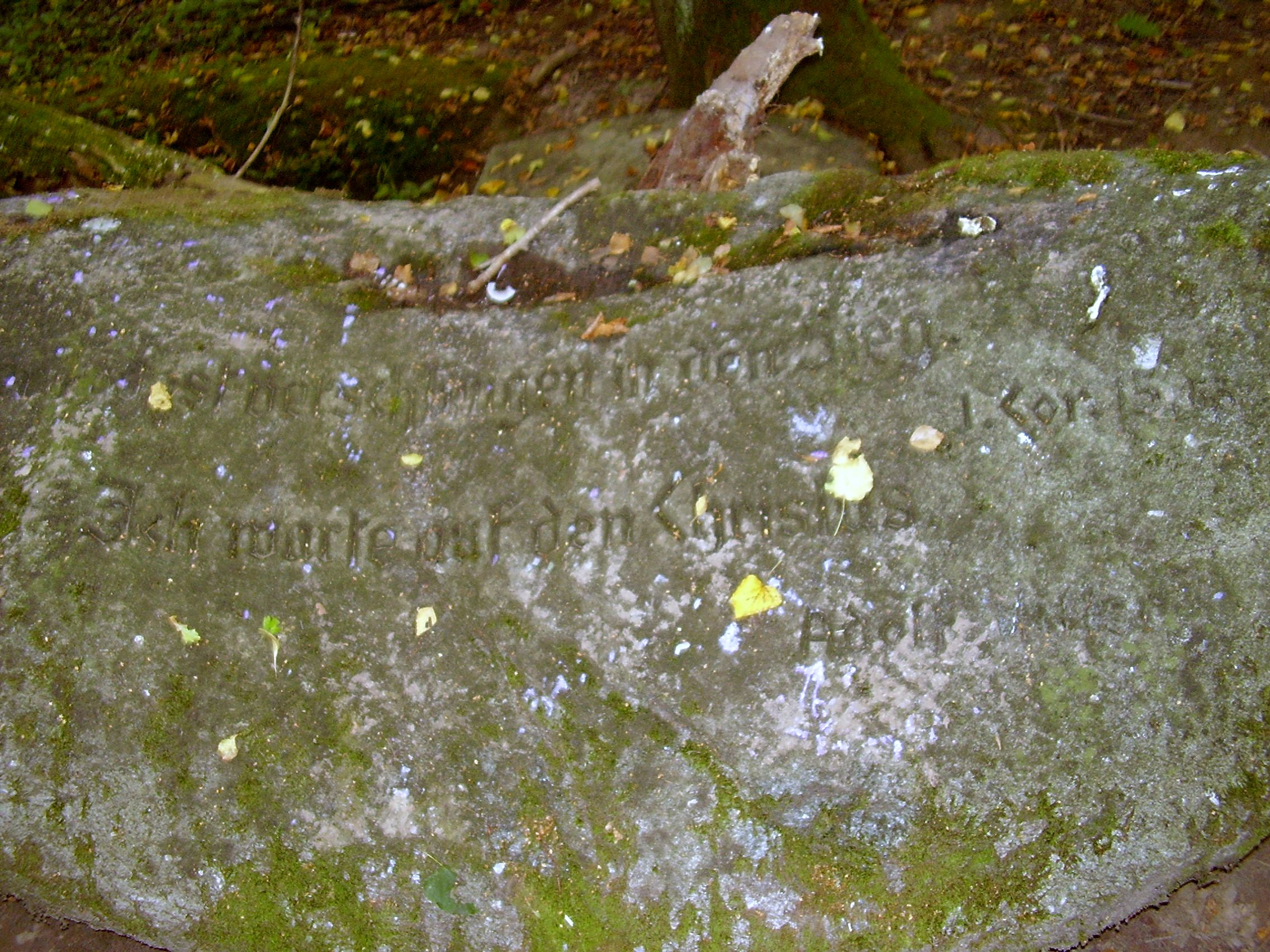 pseudomegalityczny cmantarz rodziny Dohnów (graff zu Dohna)